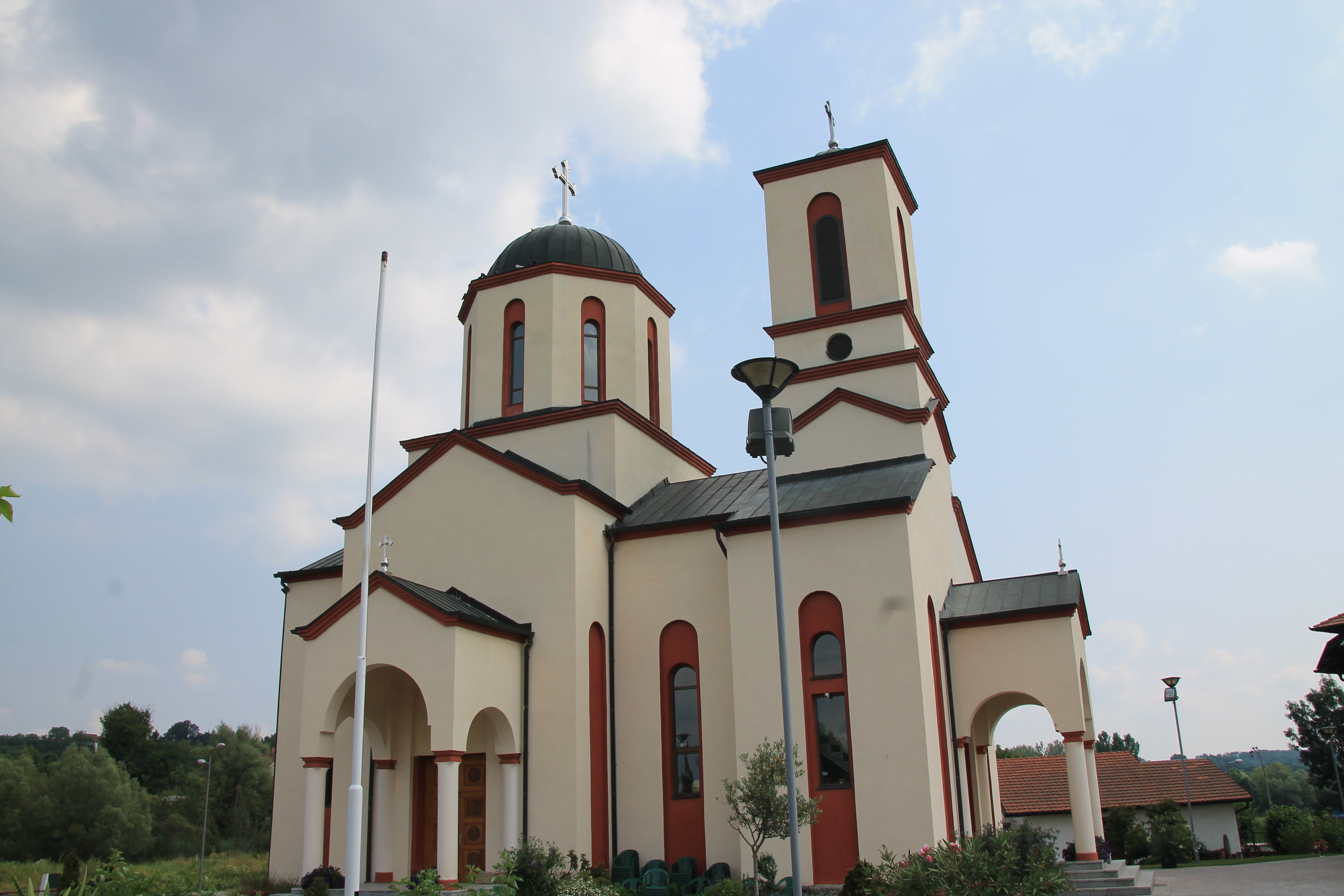 Crkva Sv. Save (Barajevo)